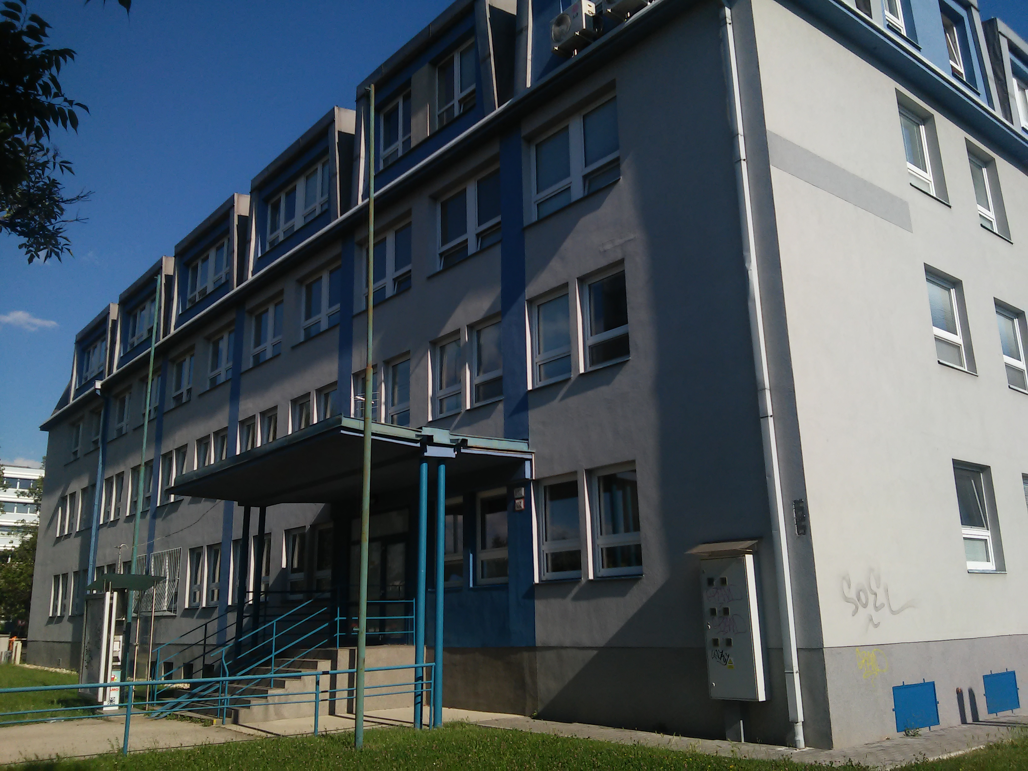 Tomášikova 22, Ružinov, Bratislava